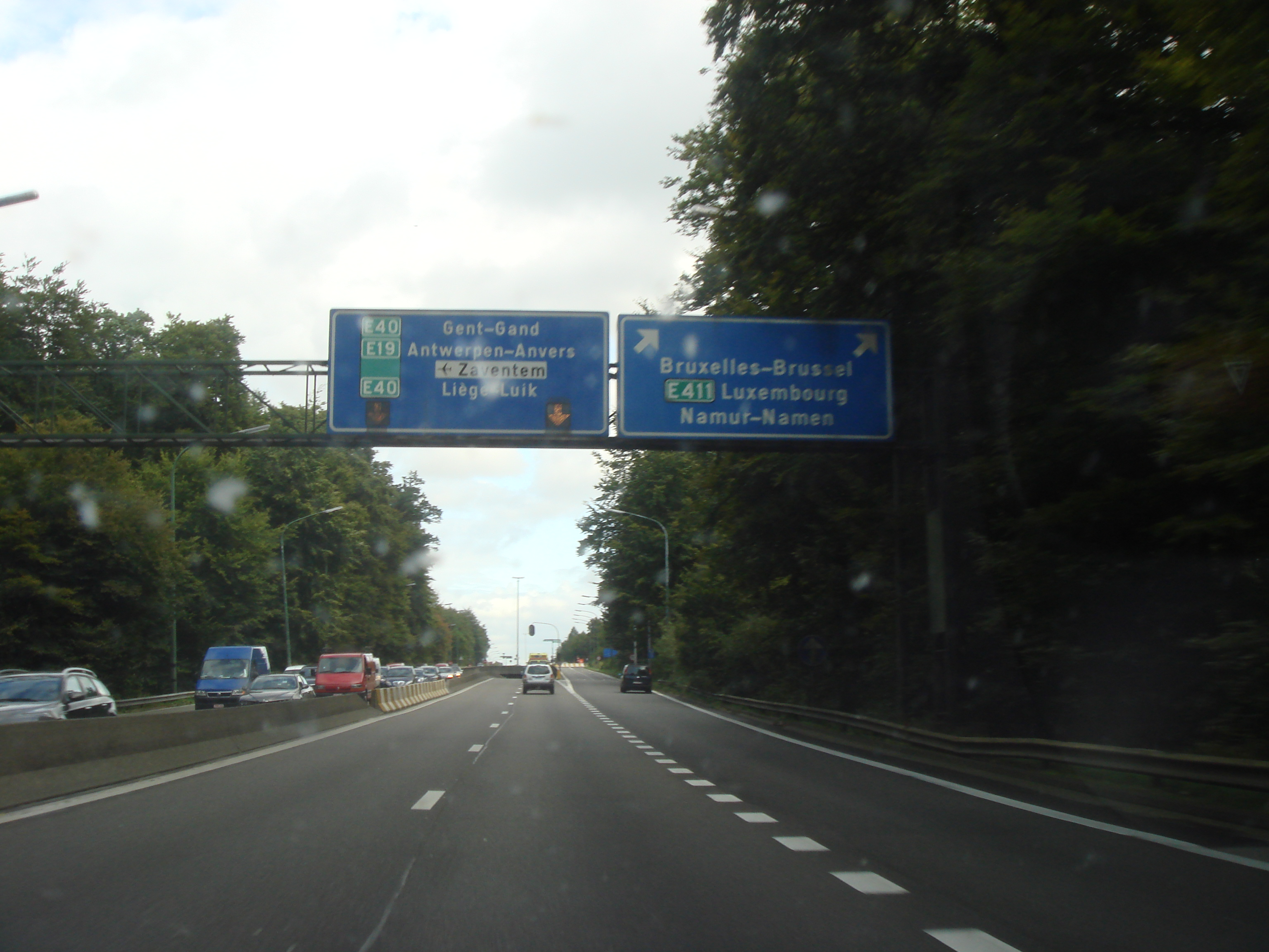 Echangeur entre le R0 (Ring Brussel) et l'autoroute E411